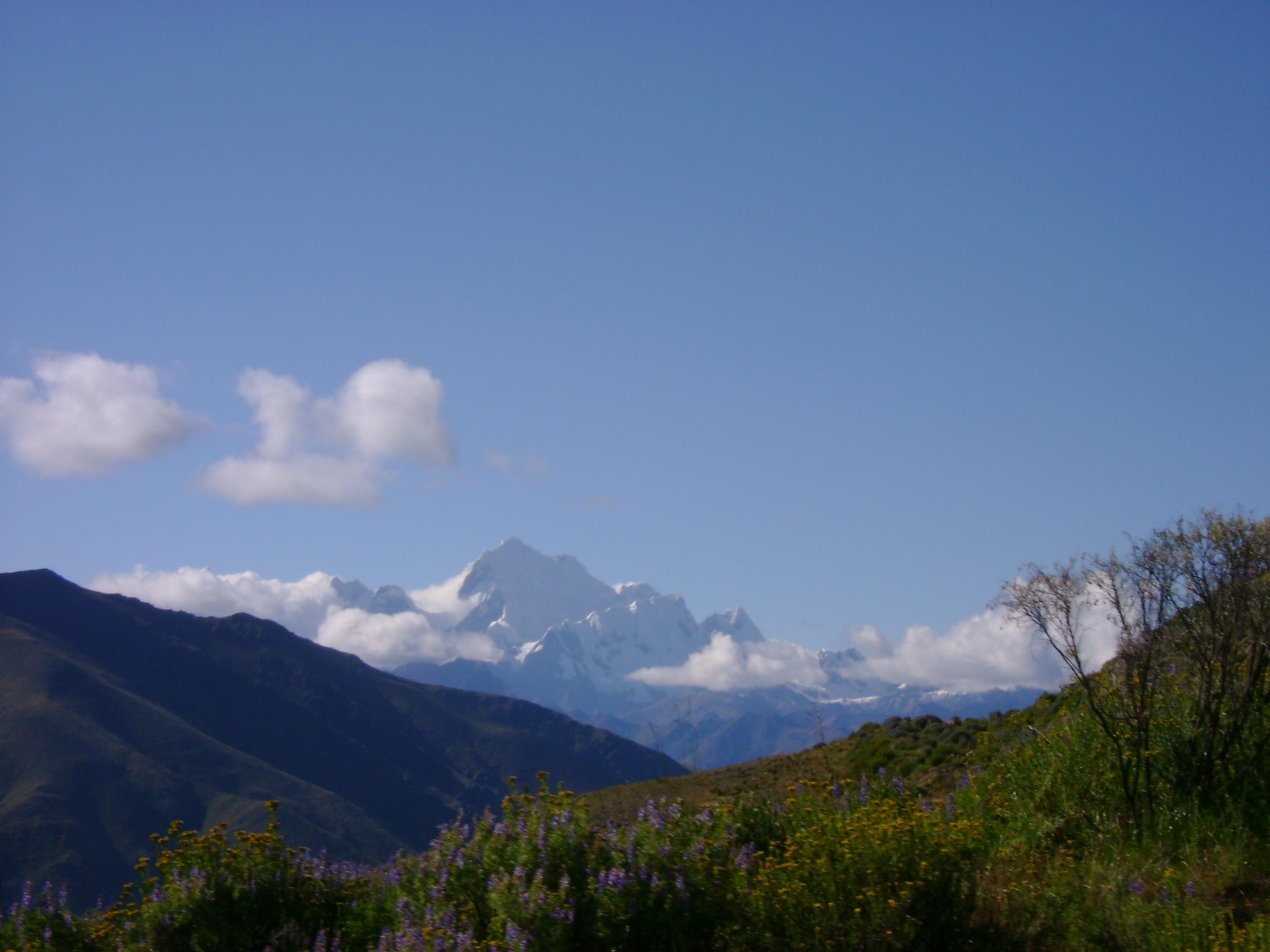 Yerupajá